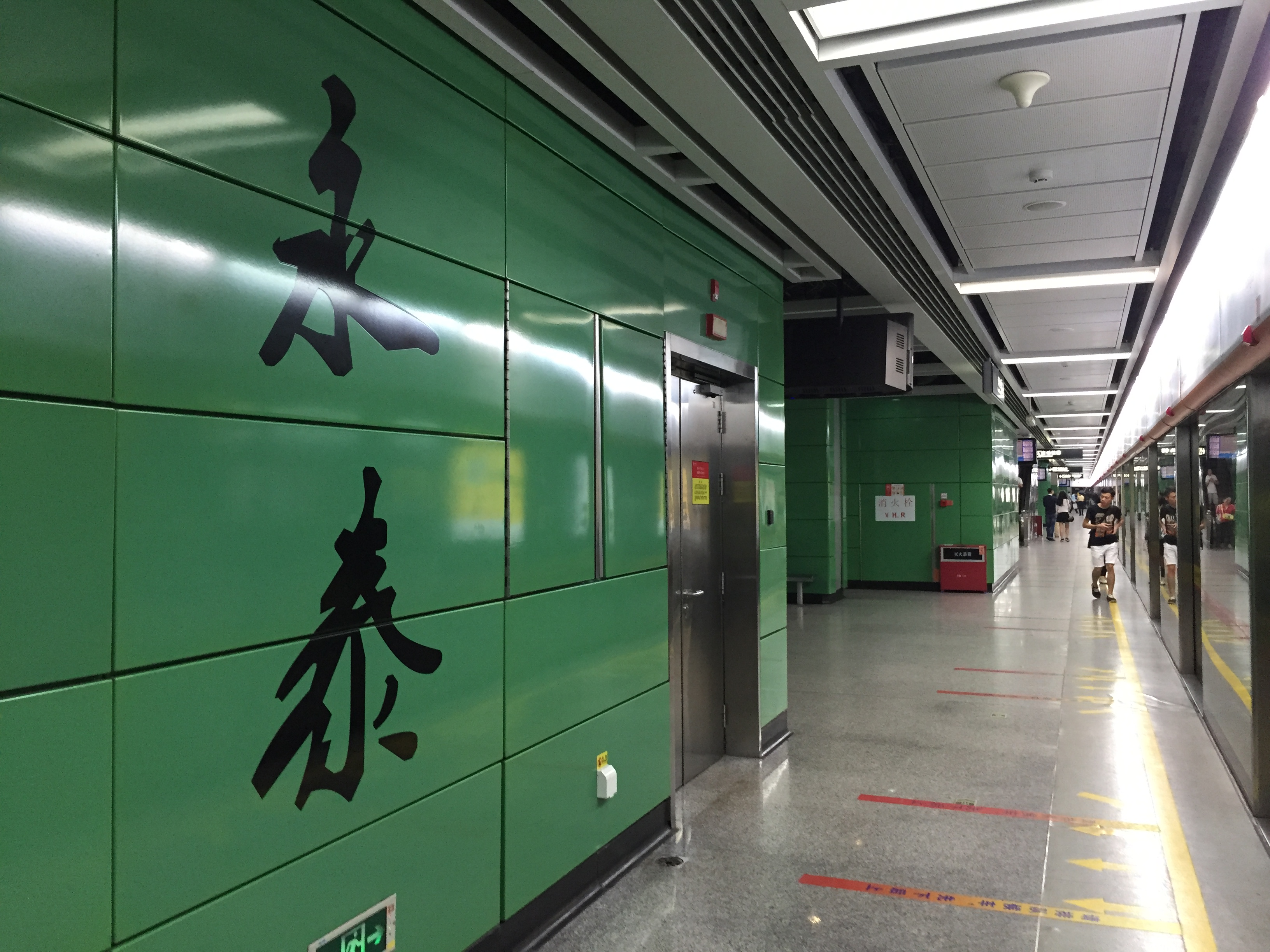 广州地铁永泰站